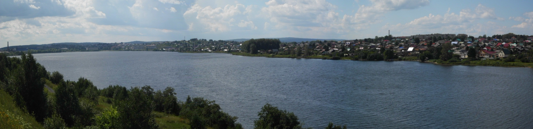 Верхнеуфалейский пруд в городе Верхний Уфалей на реке Уфалейка. Вид с юго-восточного берега. Панорамный снимок.